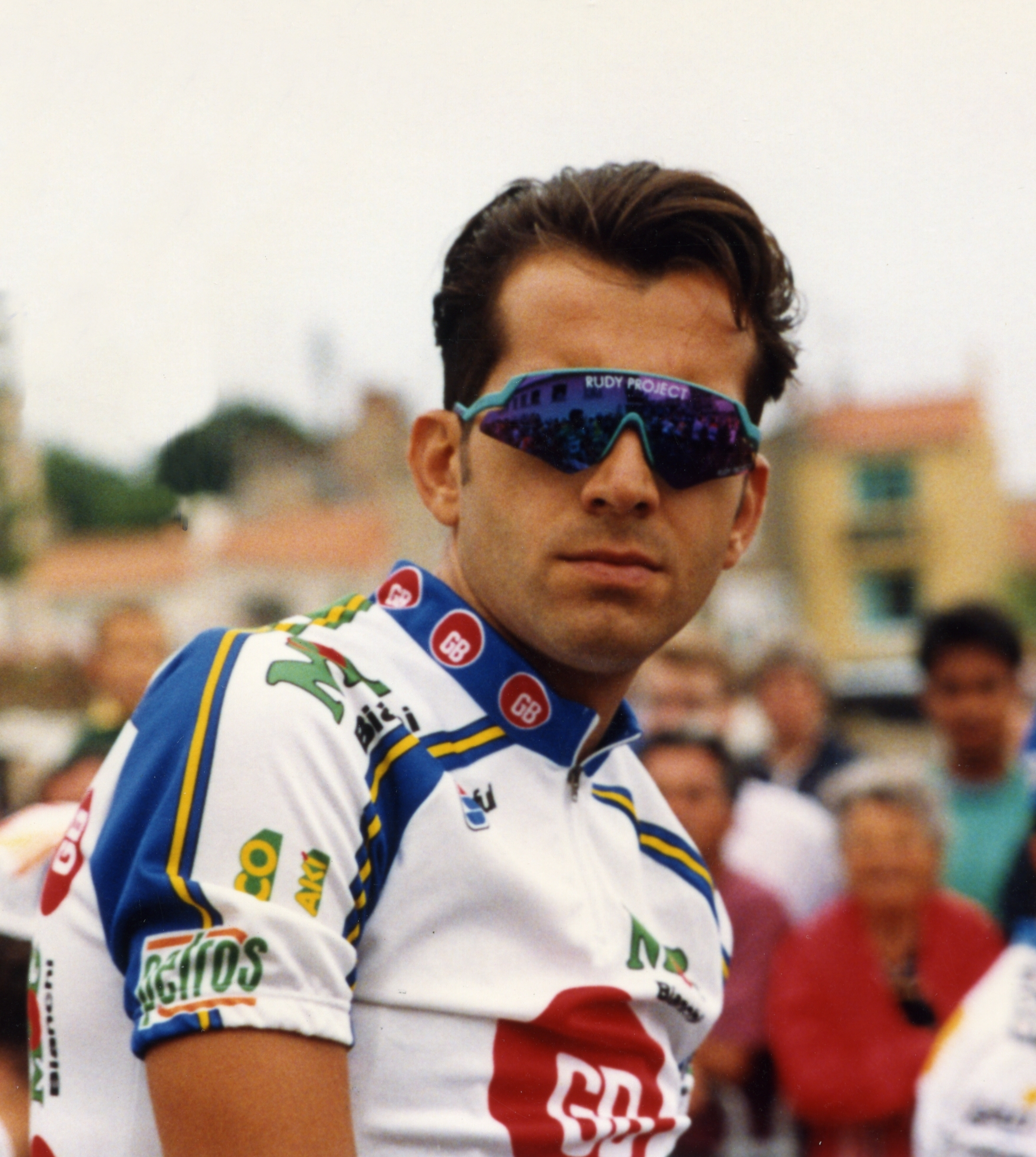 Départ des Sables d'Olonne